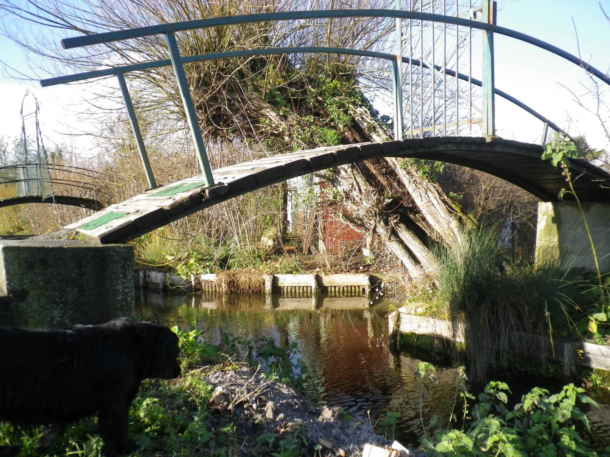 Pontet sus lei paluds